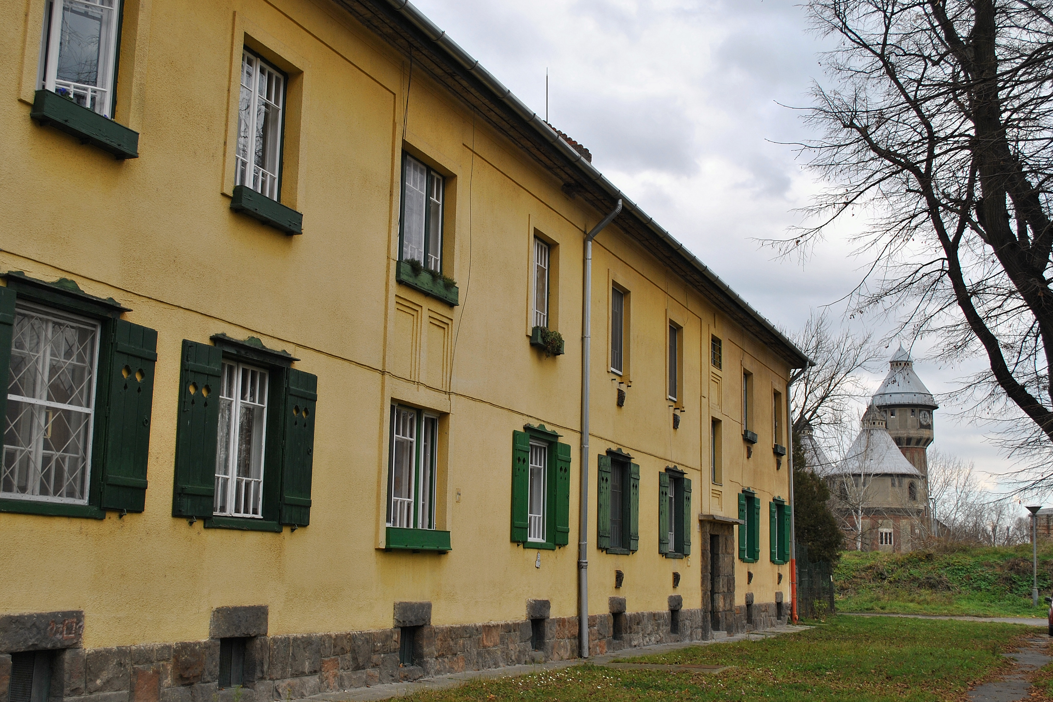 Gázgyári lakótelep I-II-III. sz. épületei. (Budapest 3, Sujtás utca) This is a photo of a monument in Hungary, Identifier: 12884